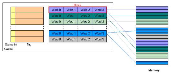 Mémoire cache directement mappée